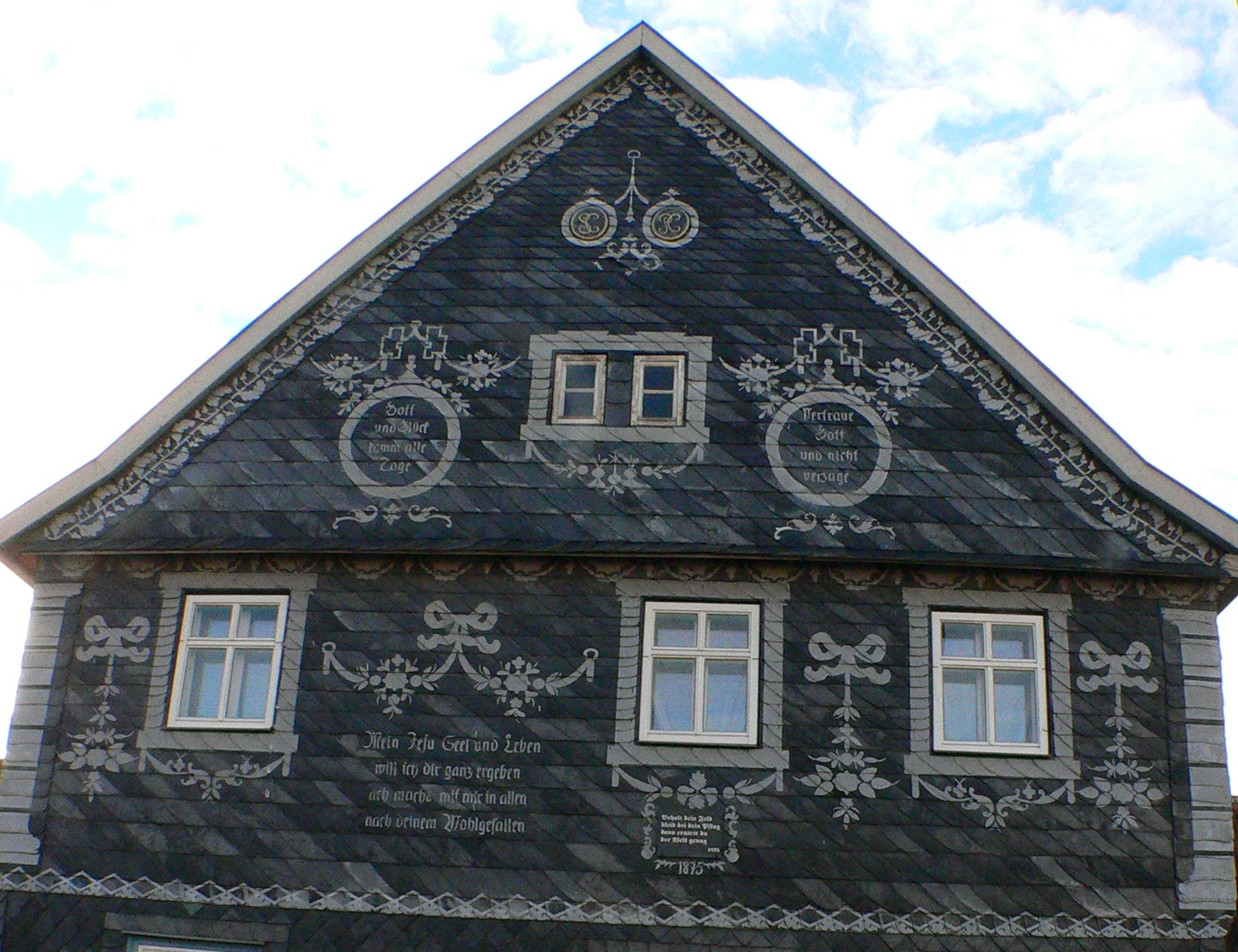 Coburg Stadtteil Scheuerfeld, Bayernstraße 8 - Schmuckgiebel